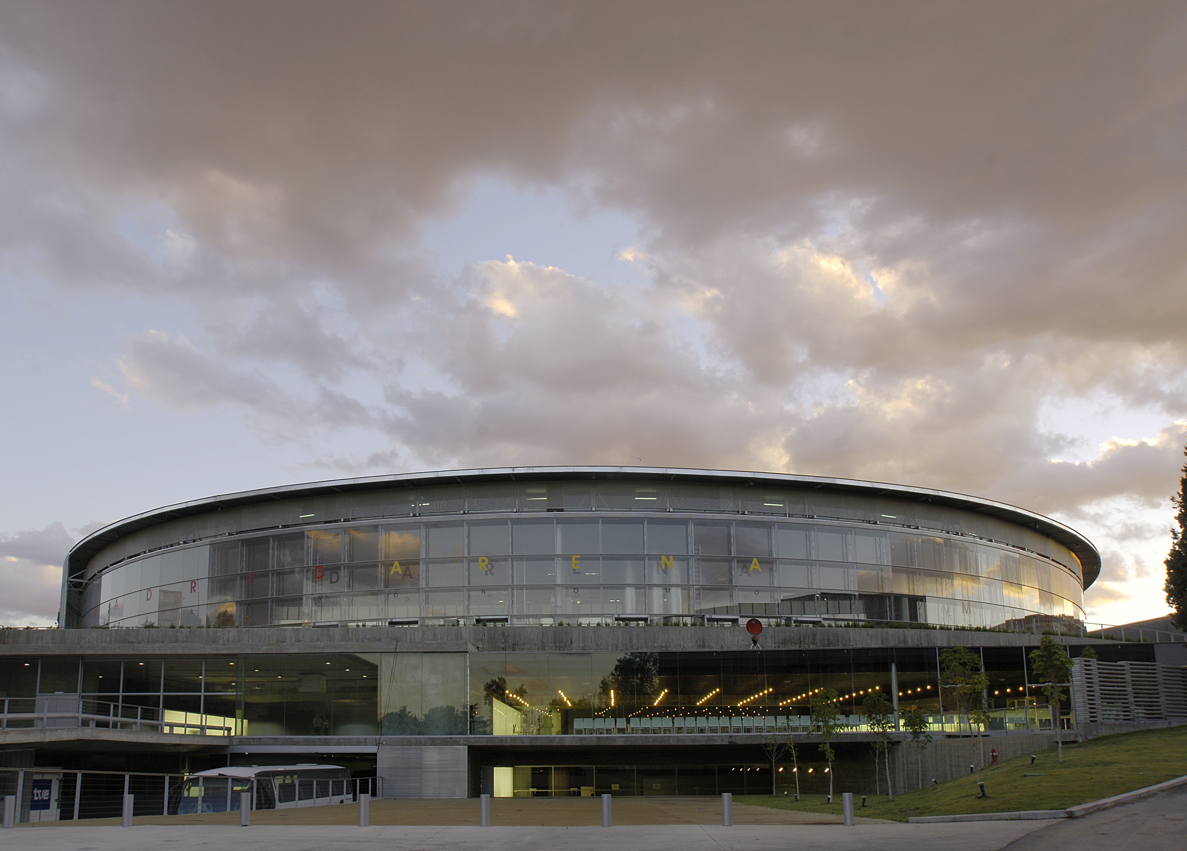 Vista exterior del Estadio